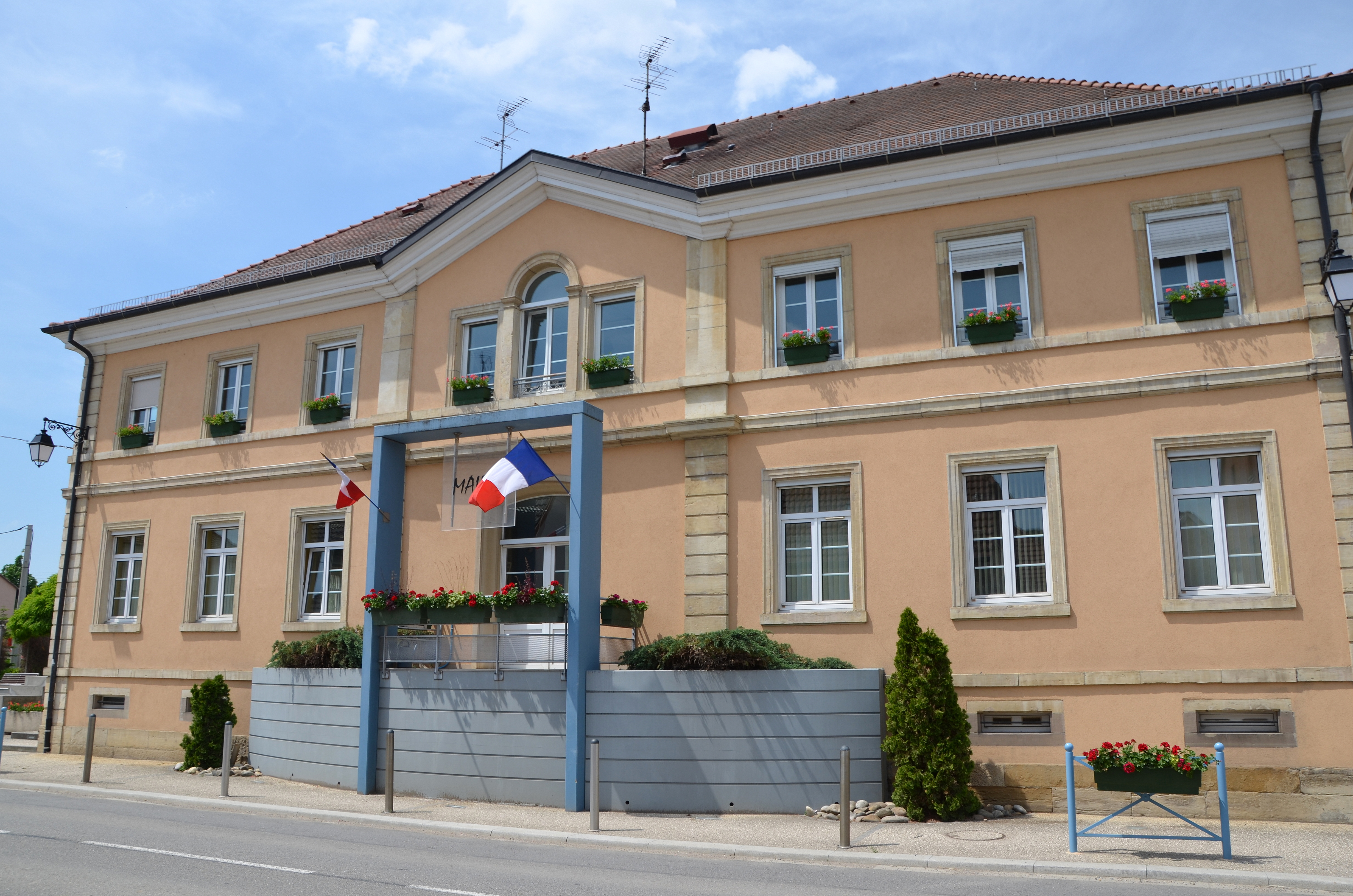 Mairie de Carspach, Haut-Rhin, Alsace, France